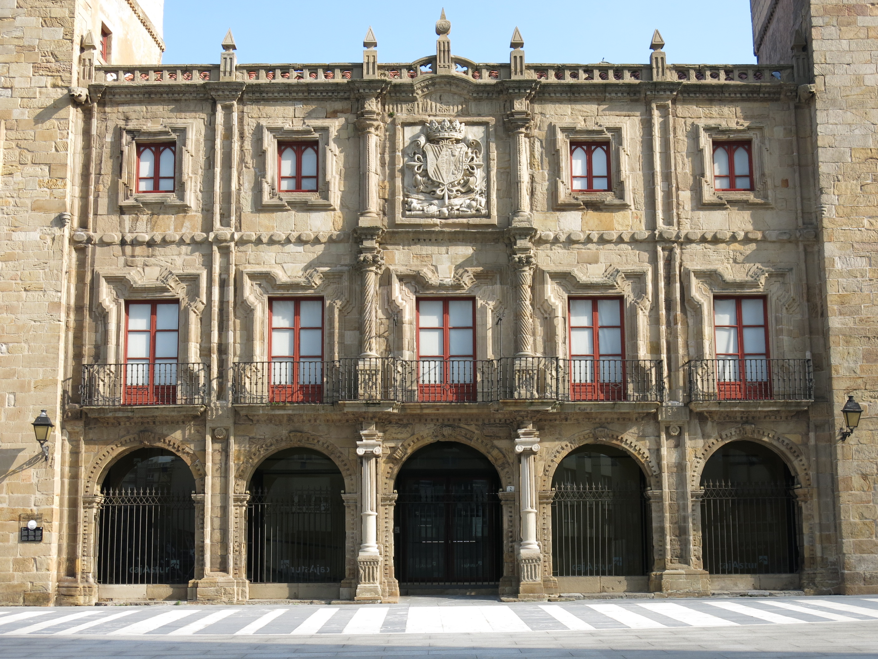 Conjunto Histórico Artístico la Colegiata y Palacio de Revillagigedo